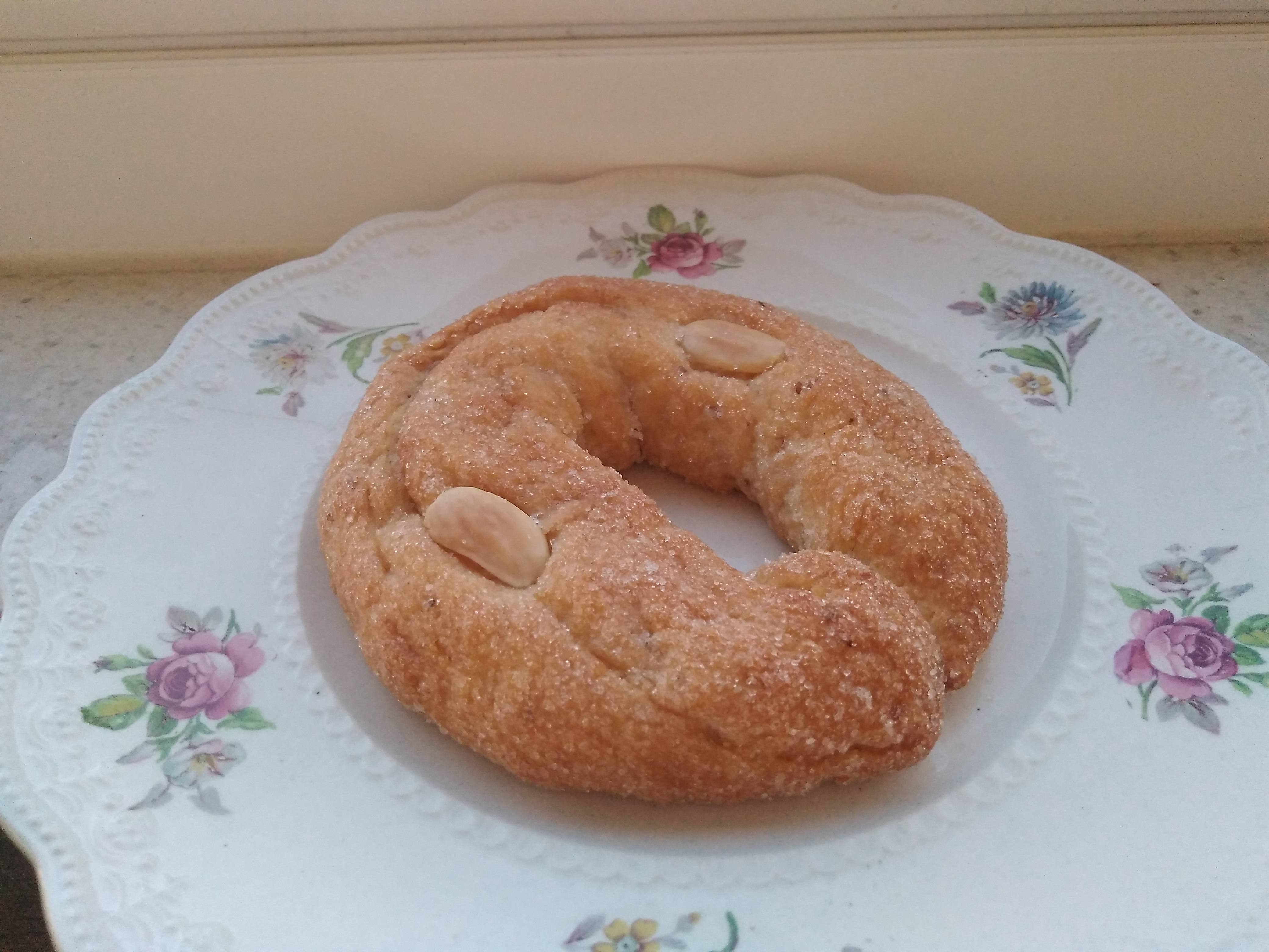 Bollo de Arcos de la Frontera (España)